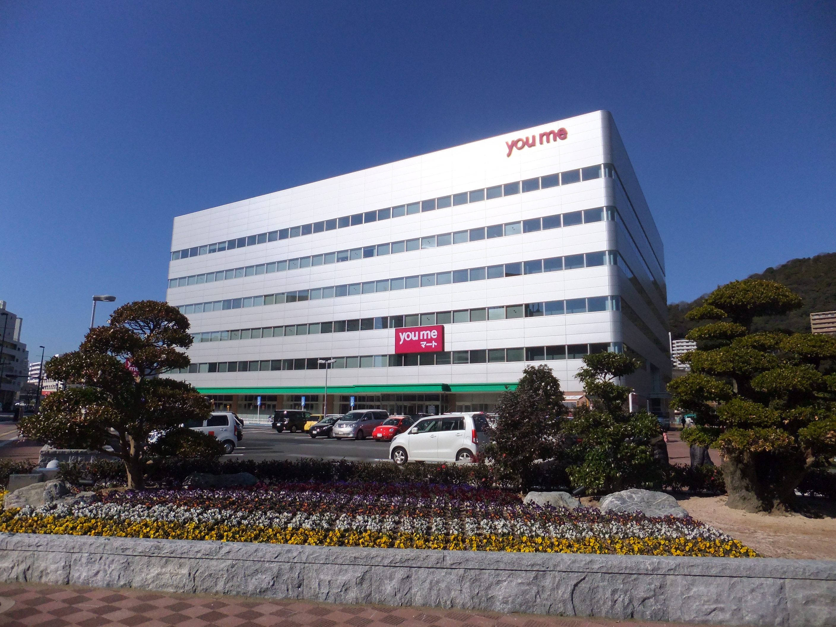 イズミ本社